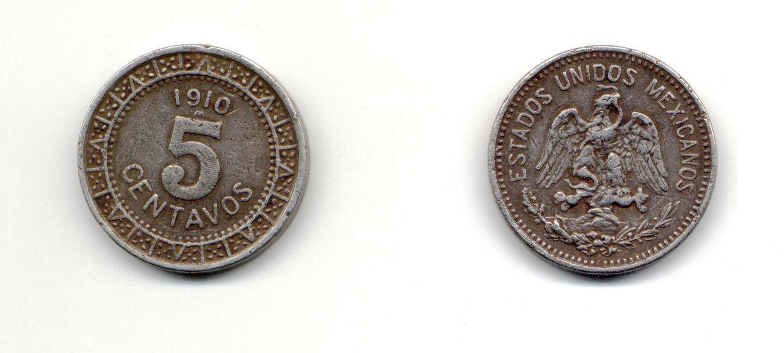 Moneda de 5 centavos acuñada en la ceca de la Ciudad de México en 1910.